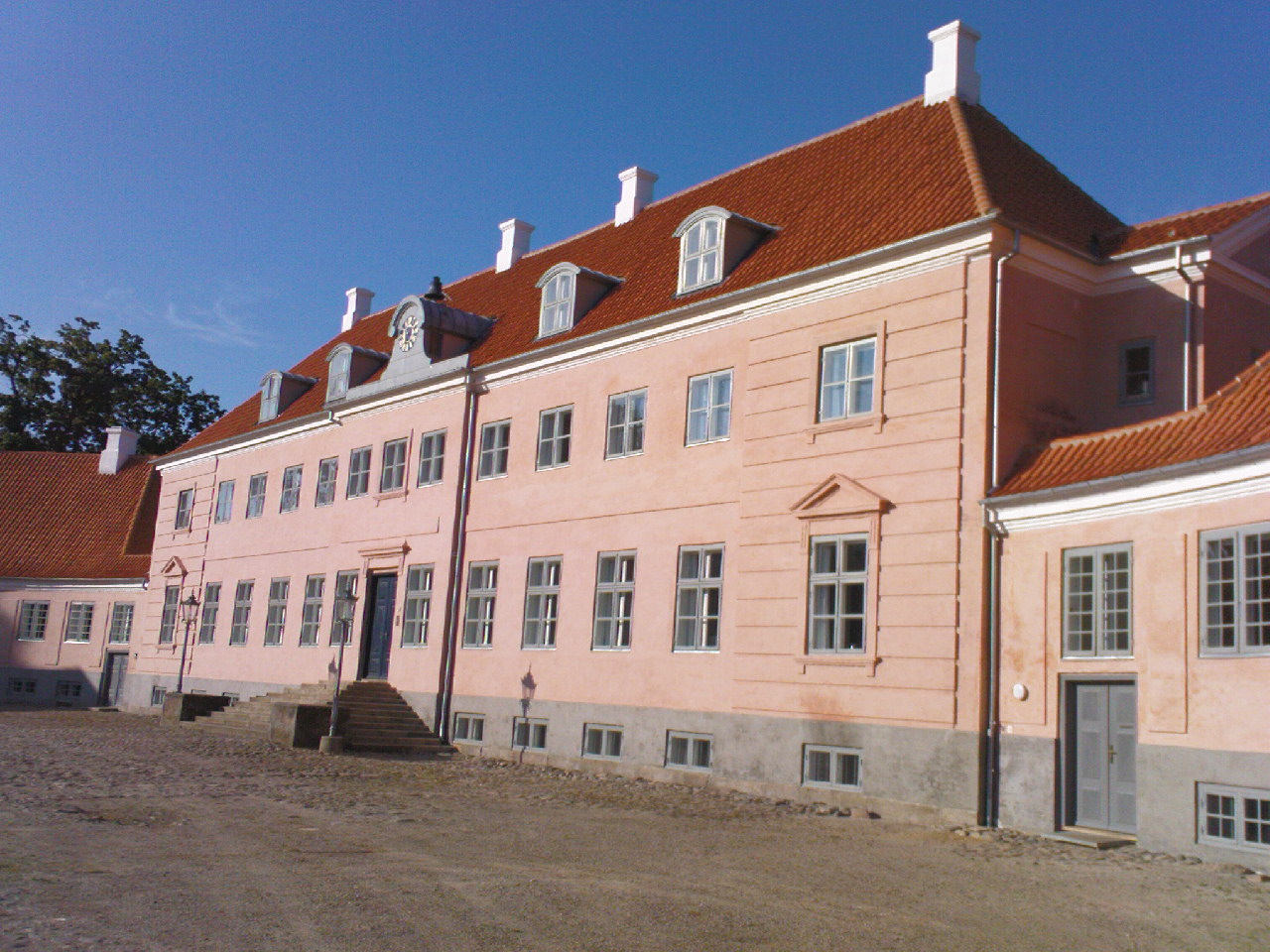 Moesgård, hovedbygningen. Renoveret og nymalet i 2009.